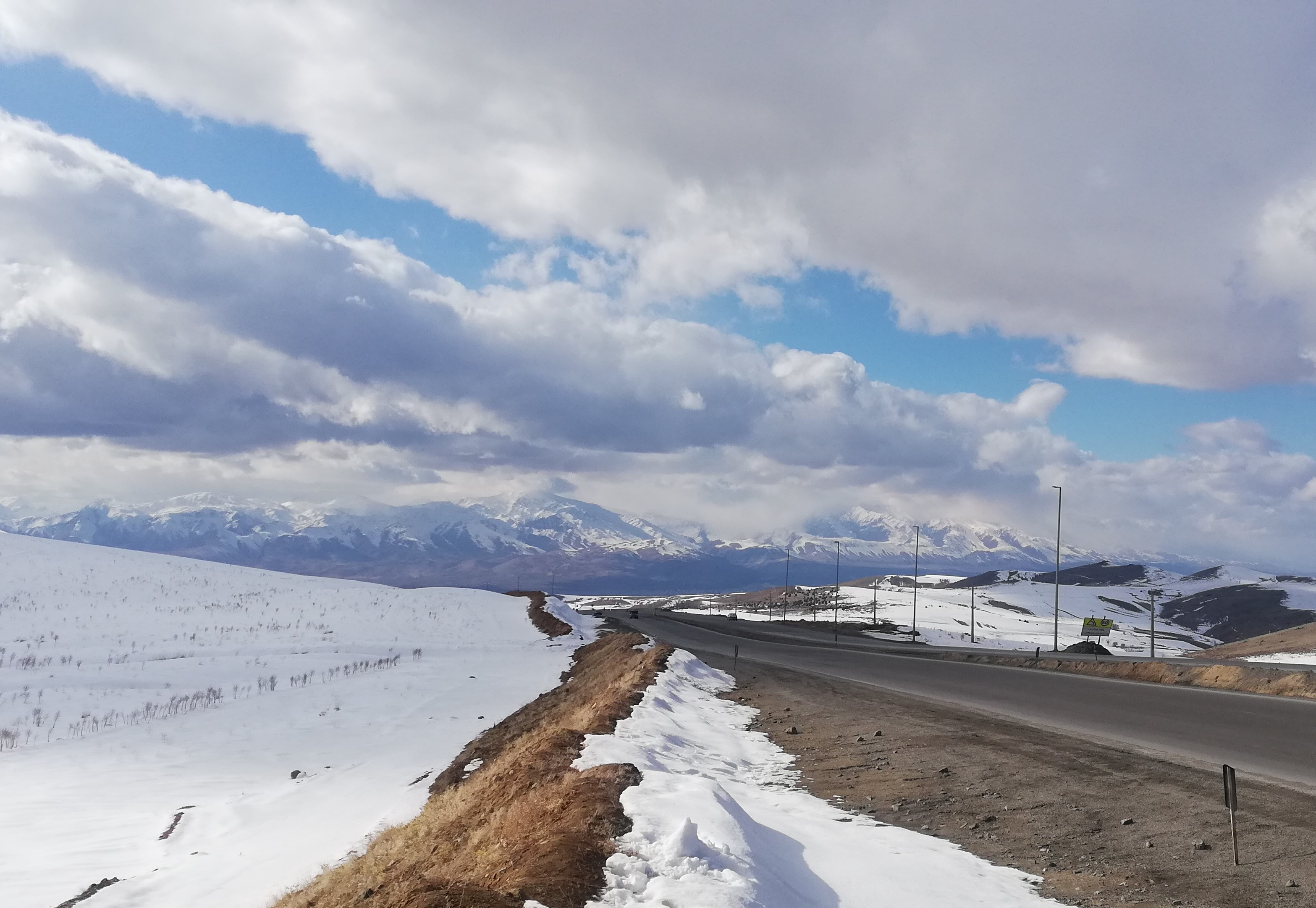 گردنه زالیان در محور بروجرد اراک قرار دارد